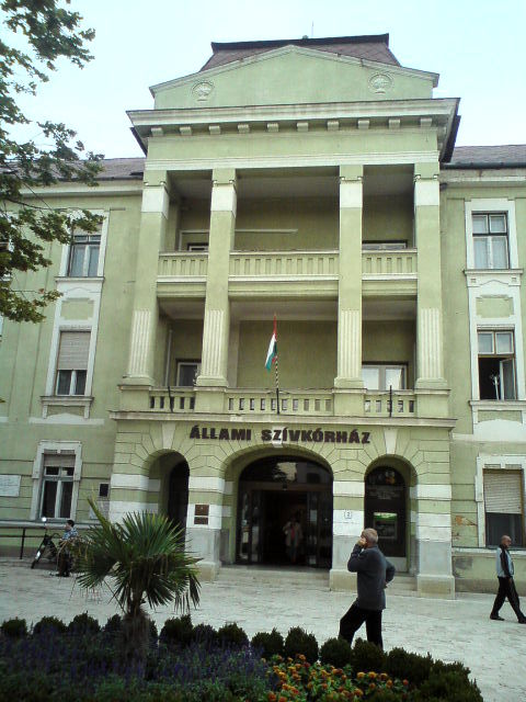 Állami Szívkórház, Balatonfüred This is a photo of a monument in Hungary, Identifier: 9742